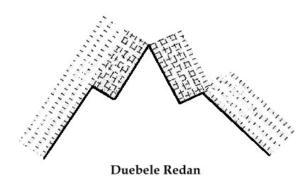 (Legrand-Girarde et Plessix. Manuel complet de fortification. 4e édition. Paris (1909).) Kategorie: Militärarchitektur